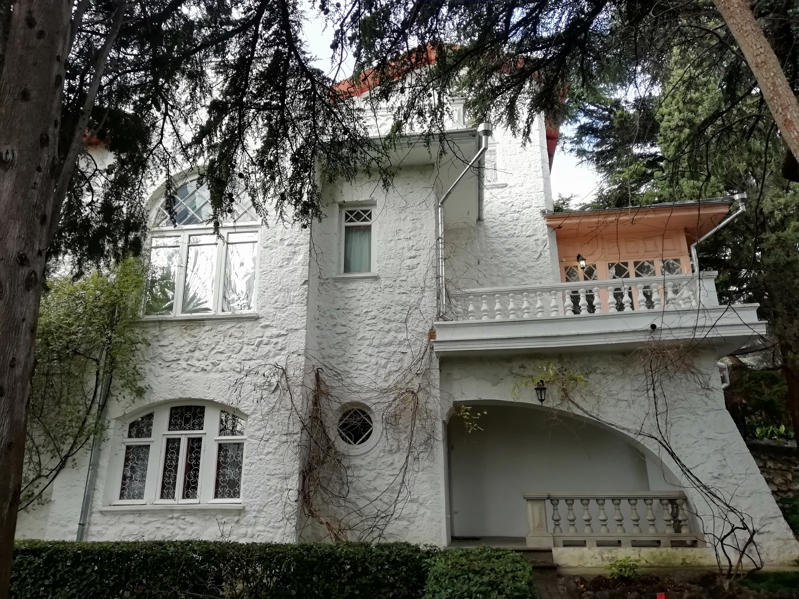 Южный фасад дома